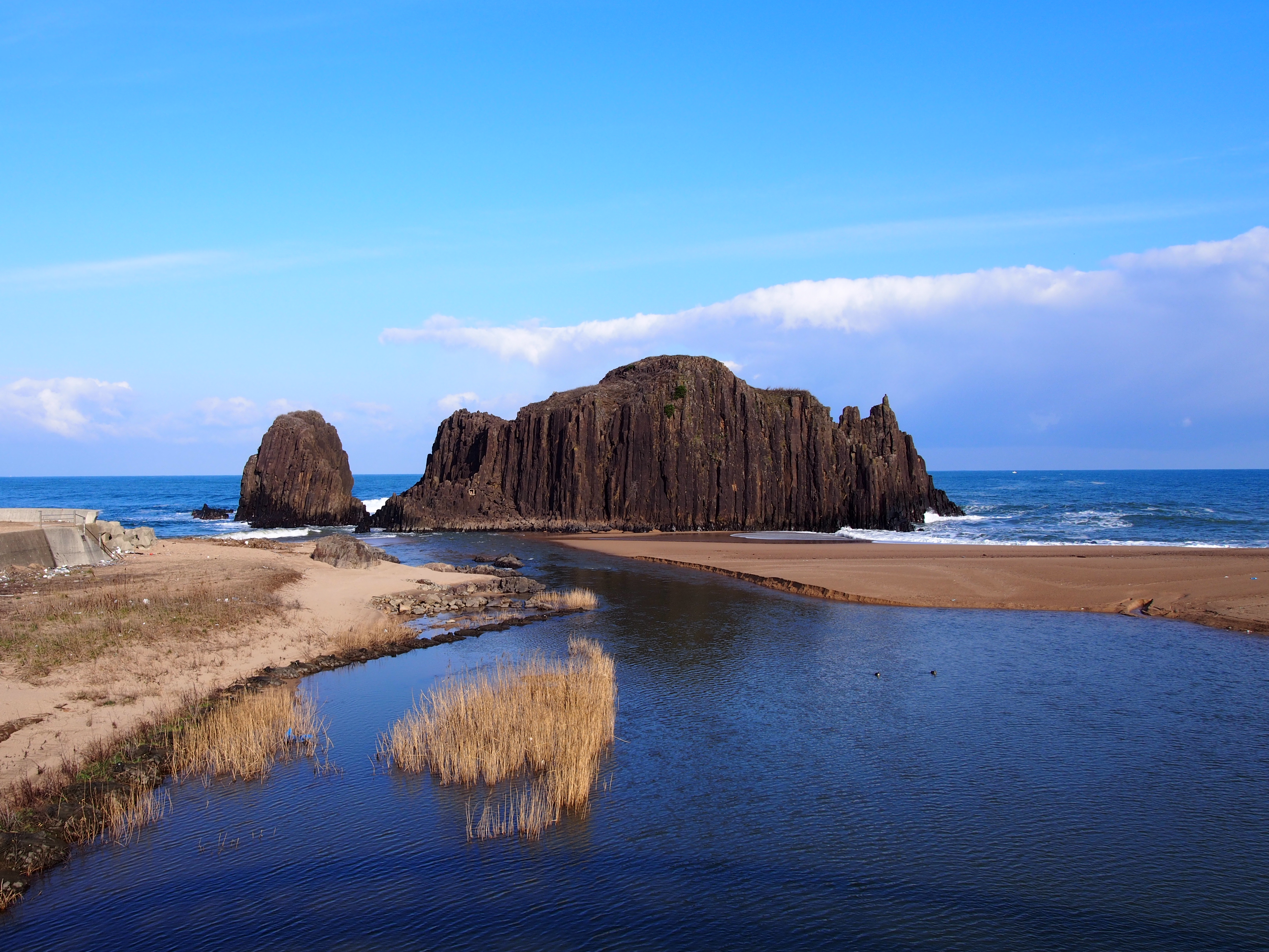 立岩（京都府京丹後市丹後町間人、竹野）